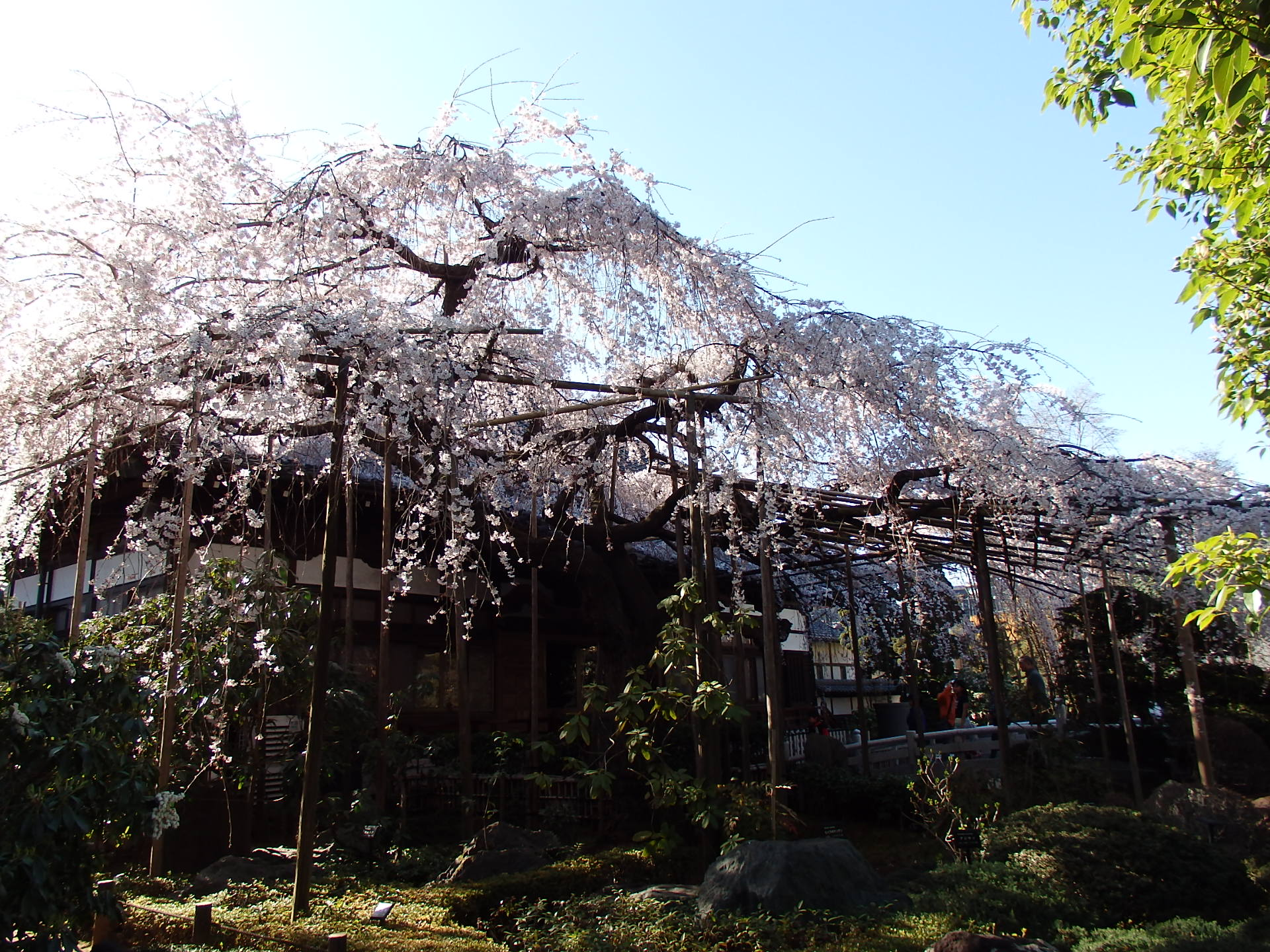 春の浦和玉蔵院